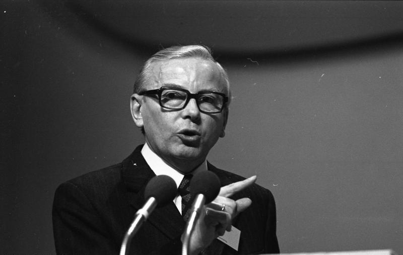 22. Bundesparteitag der CDU in Hamburg (MdB Dr. Manfred Luda) 18.-20.11.1973